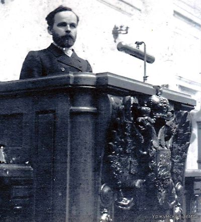 Александр Егорович Кропотов (31 марта 1874 — 1934) — крестьянин, эсер, депутат Государственной думы III созыва от Вятской губернии и Всероссйиского Учредительного собрания. Выступает в Думе.